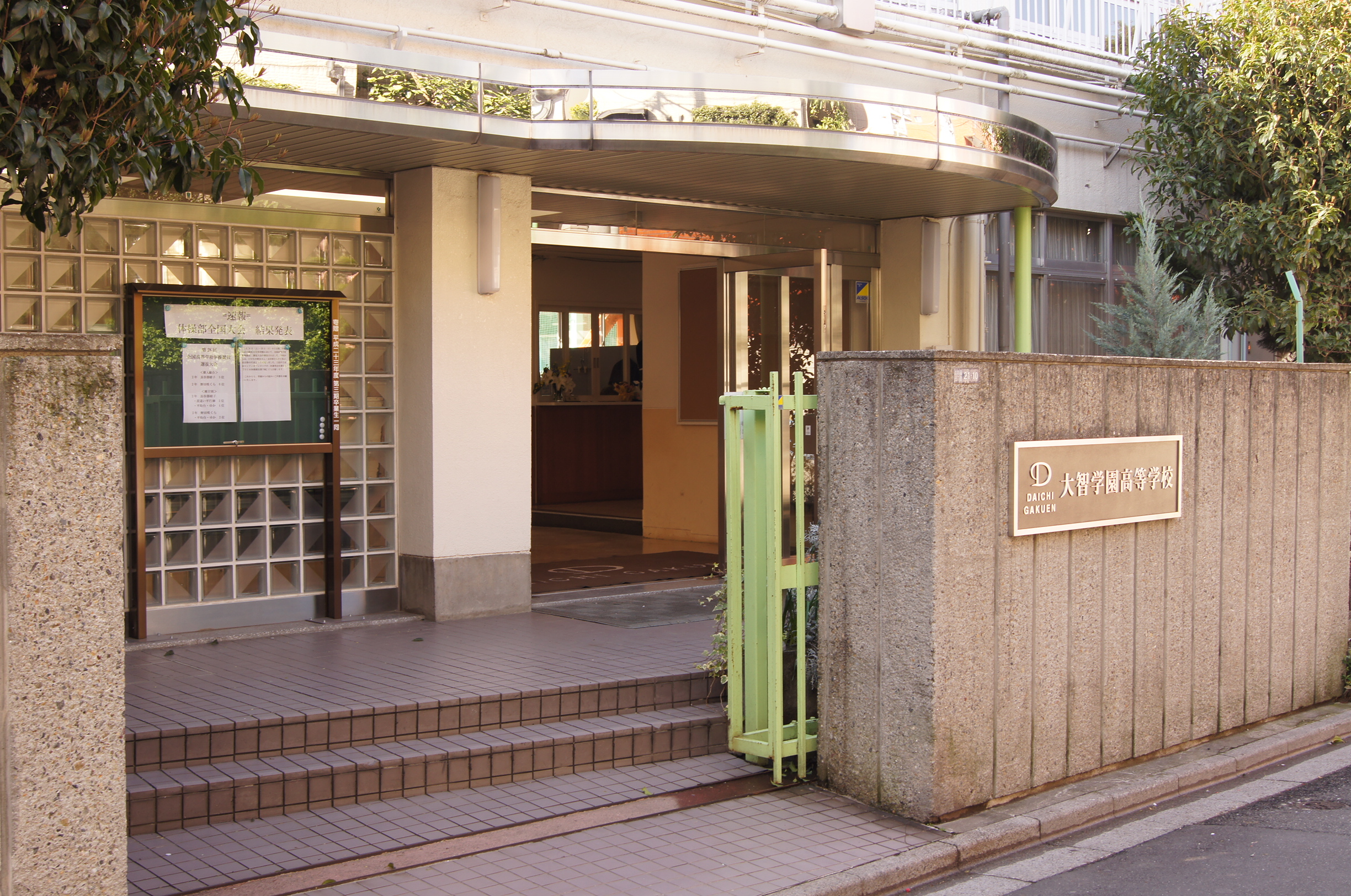 大智学園高校新宿校の玄関。